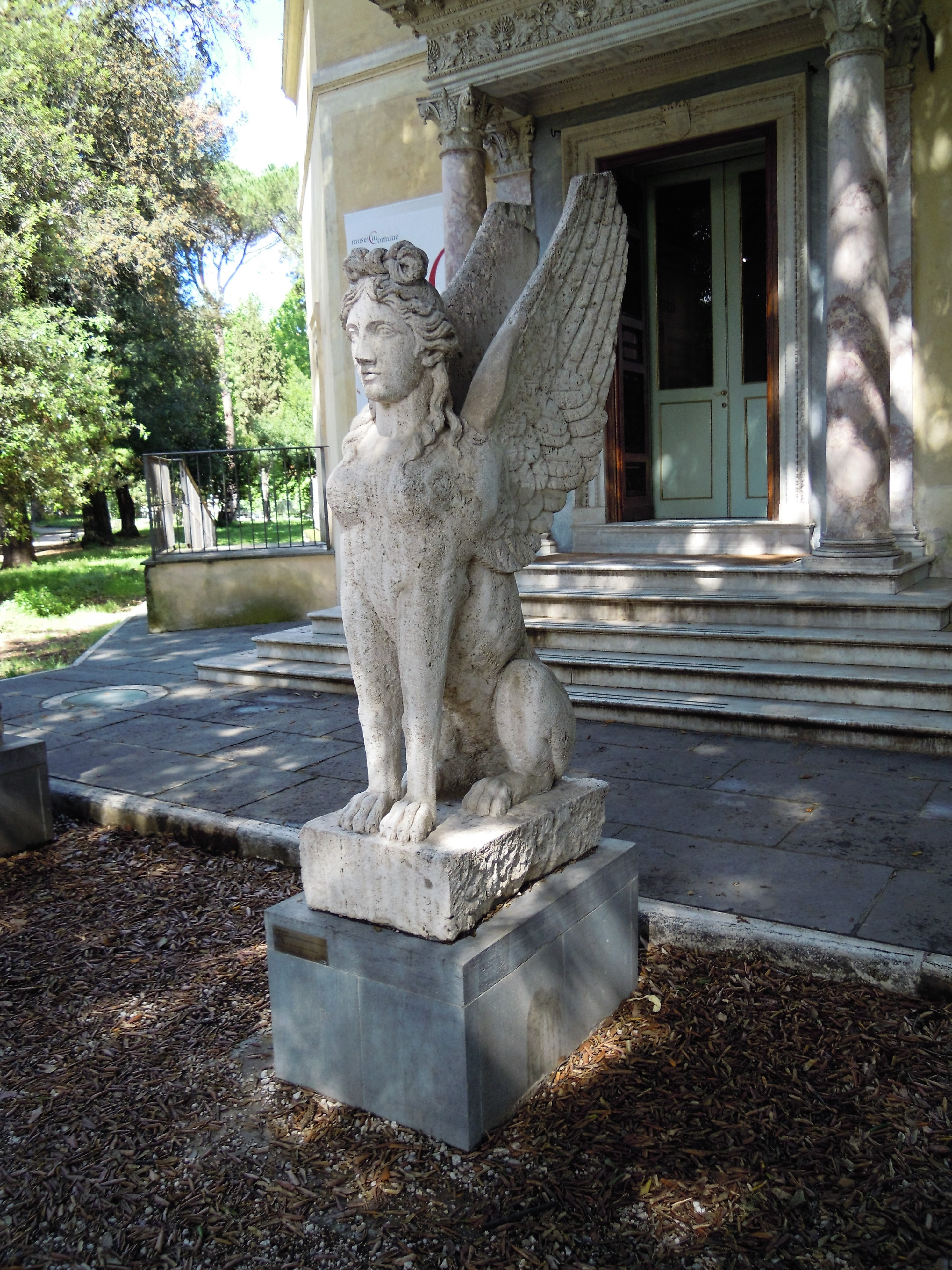 Roma, Villa Torlonia - sfinge alata del Casino dei principi